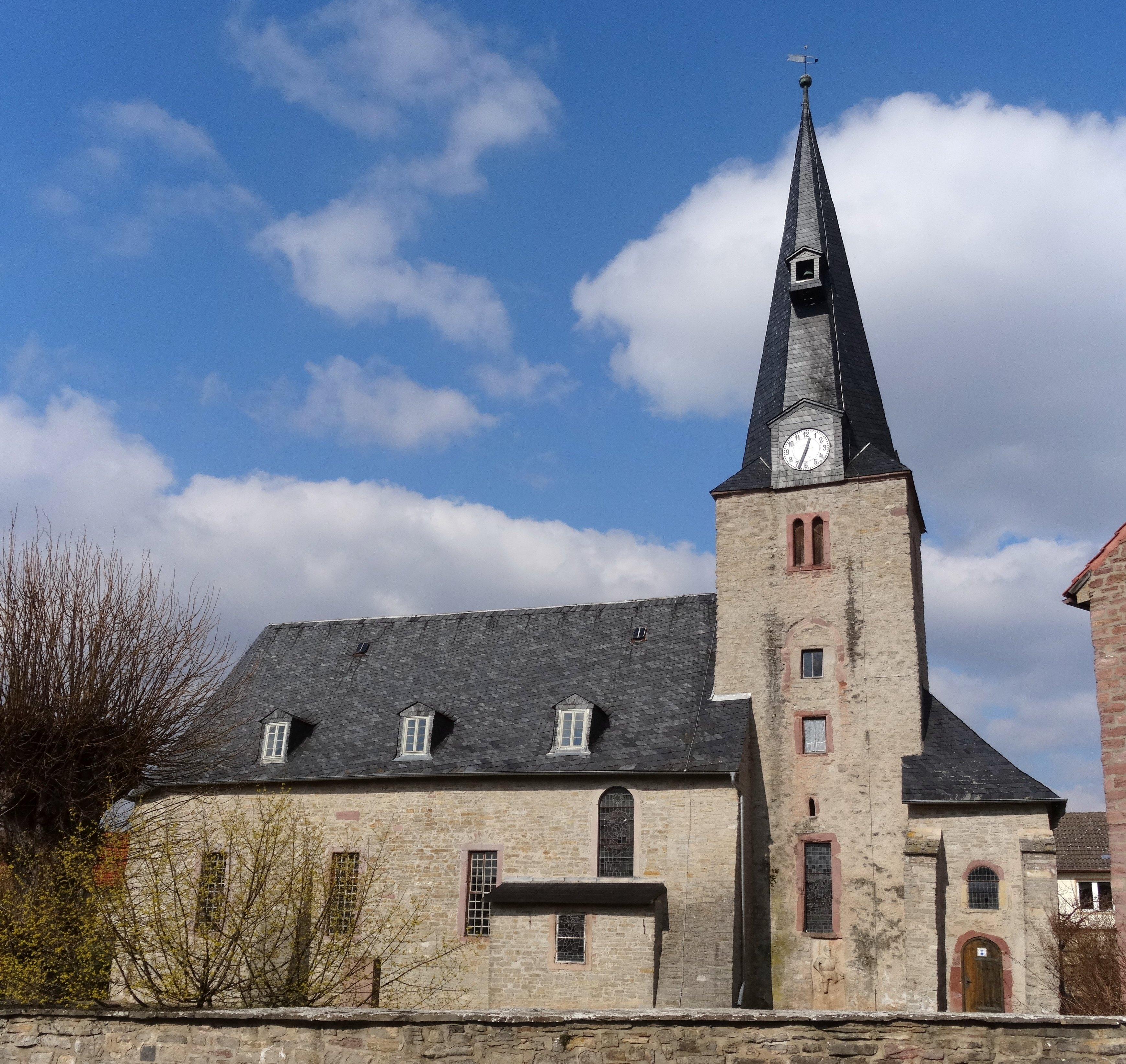 Kirche St. Michael Großleinungen